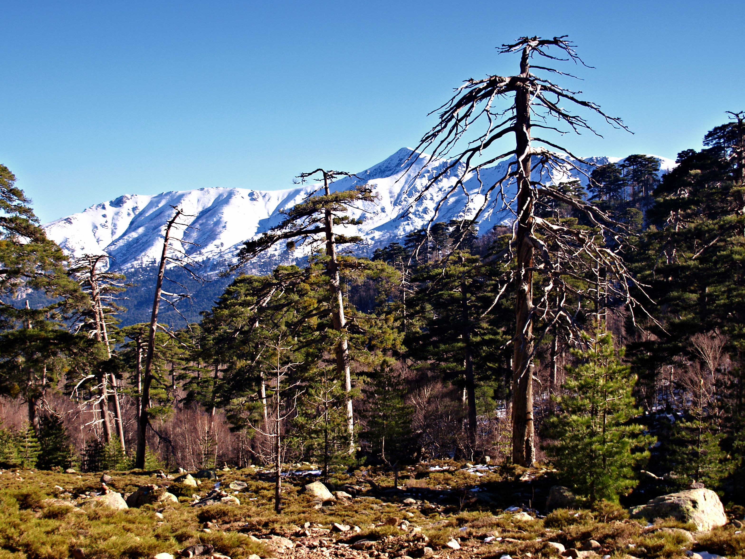 Albertacce (Corsica) - Pinus nigra sur le GR 20 à Radule